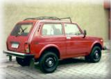 Lada Niva RC 1995 1.6cc